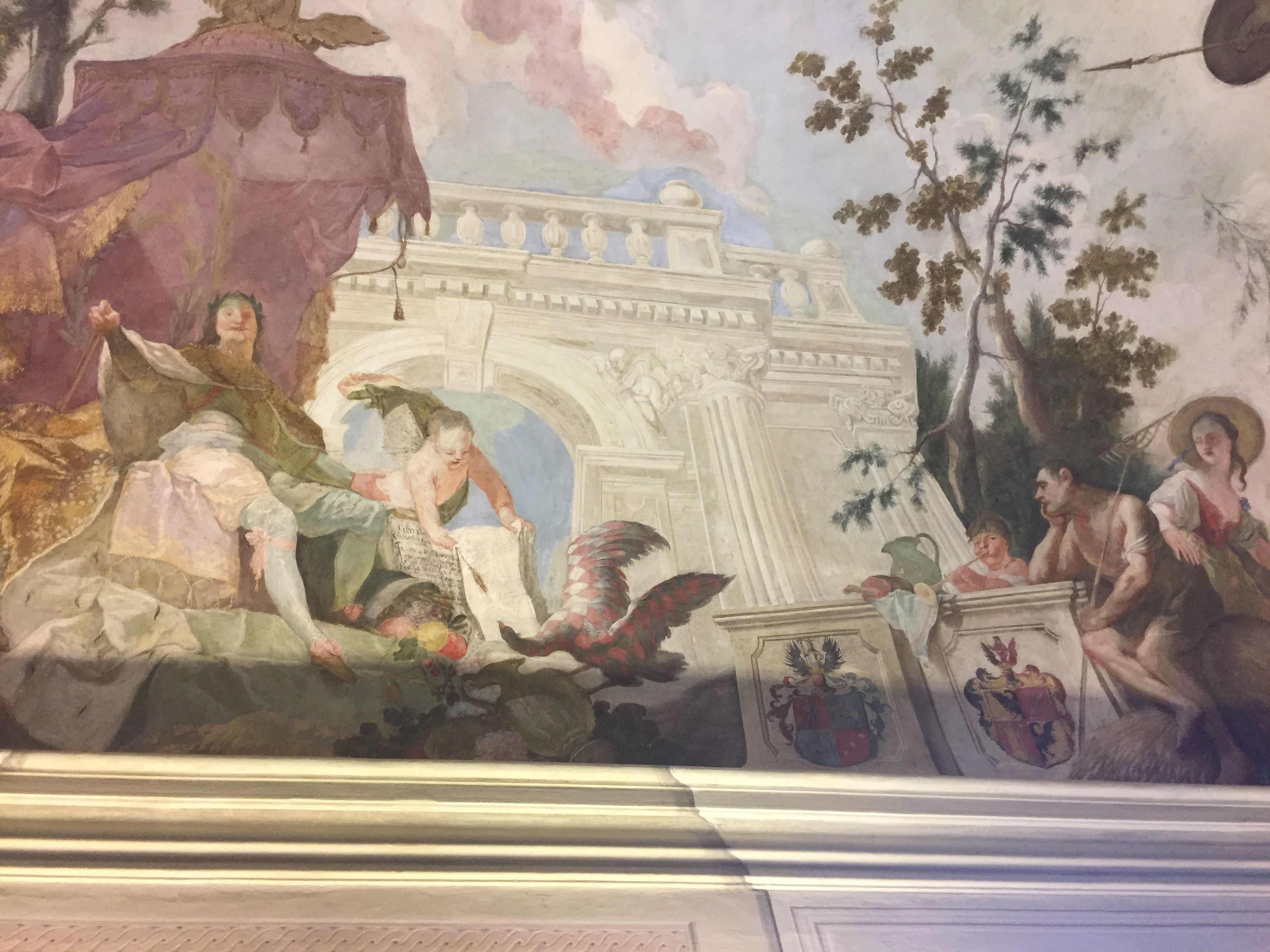 Sál se nachází poblíž bývalého sněmovního sálu, dnes zastupitelského sálu zastupitelstva města Brna na Nové radnici v Brně.